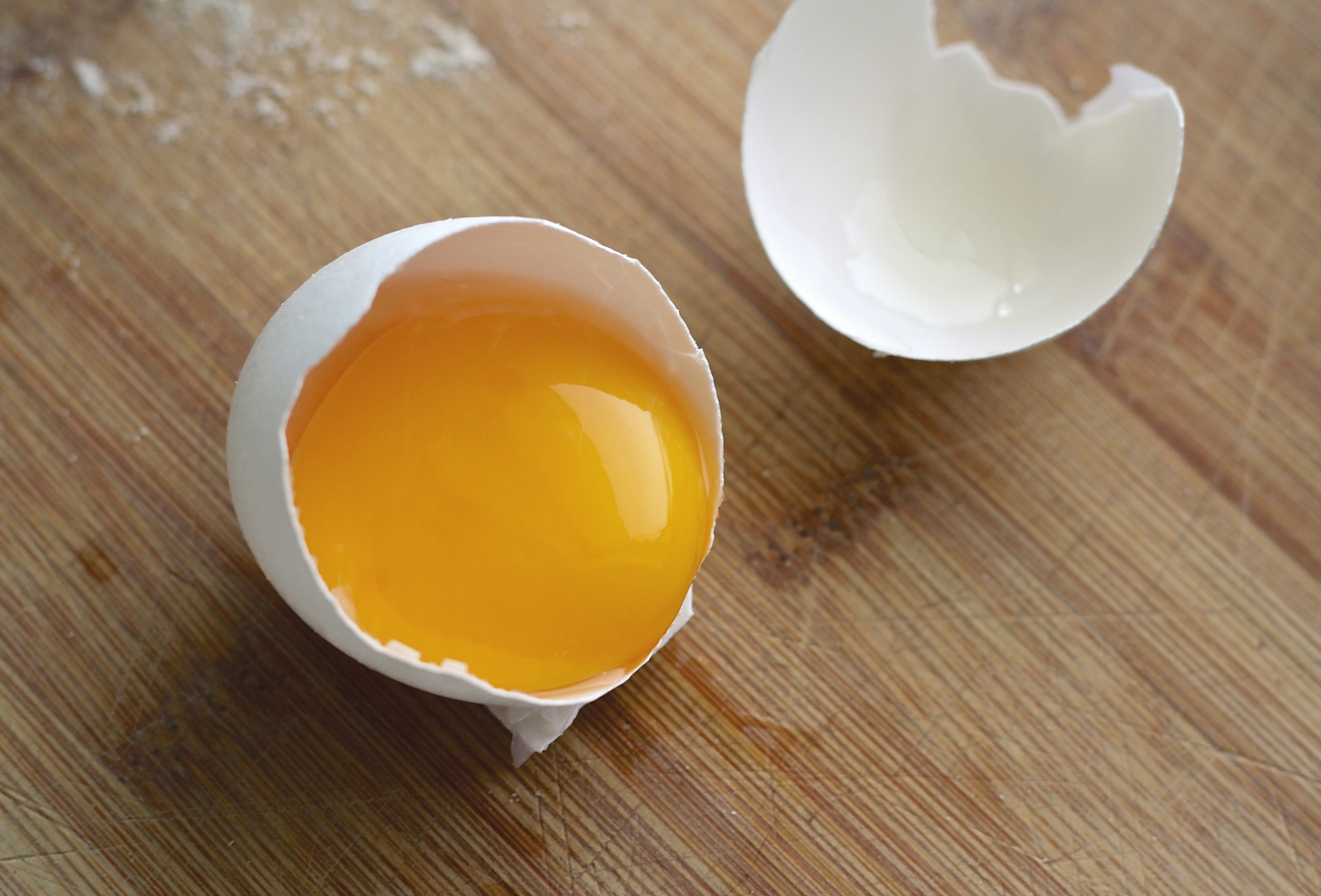 Jaune d’œuf.